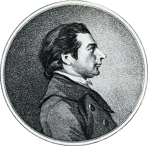 Gravure: Jacobus Bellamy (1757-1786), in Vlissingen geboren. Student theologie in Utrecht, publiceerde in 1782-1783 negen stukjes patriottische poëzie Vaderlandsche gezangen van Zelandus.